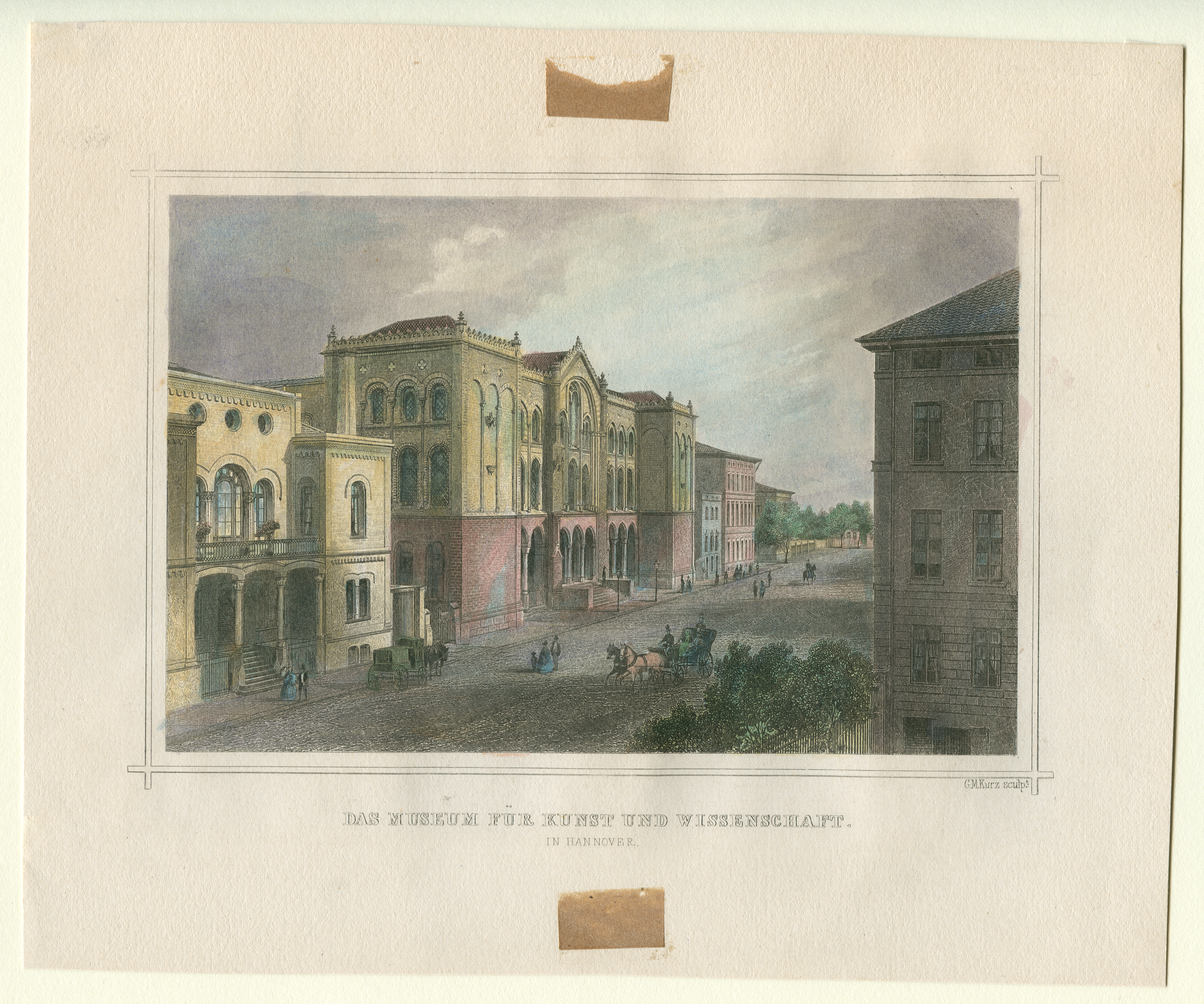 "Das Museum für Kunst und Wissenschaft in Hannover", heute das Künstlerhaus (unvollständig kolorierter) Stahlstich von Georg Michael Kurz, vor 1858. Die braunen Flecken oben und unten am Blatt sind Papierreste von der Hinterklebung hinter ein Passepartout.